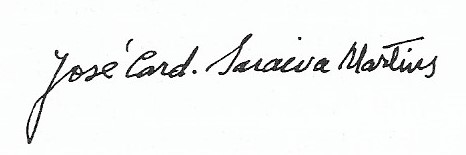 Firma del cardinale José Saraiva Martins